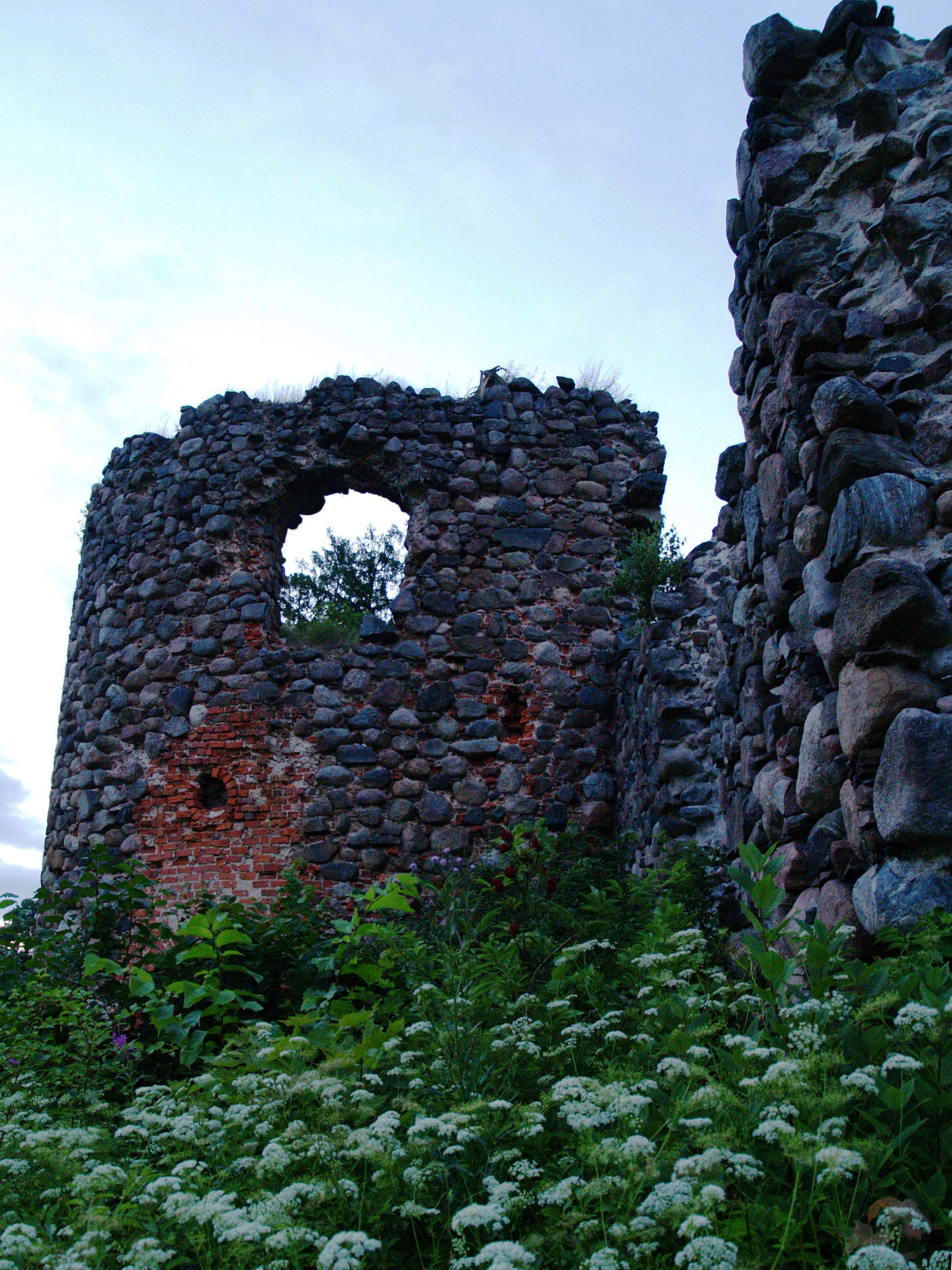 Härgmäe ordulinnus. Läänetiiva ümmargune väravatorn.